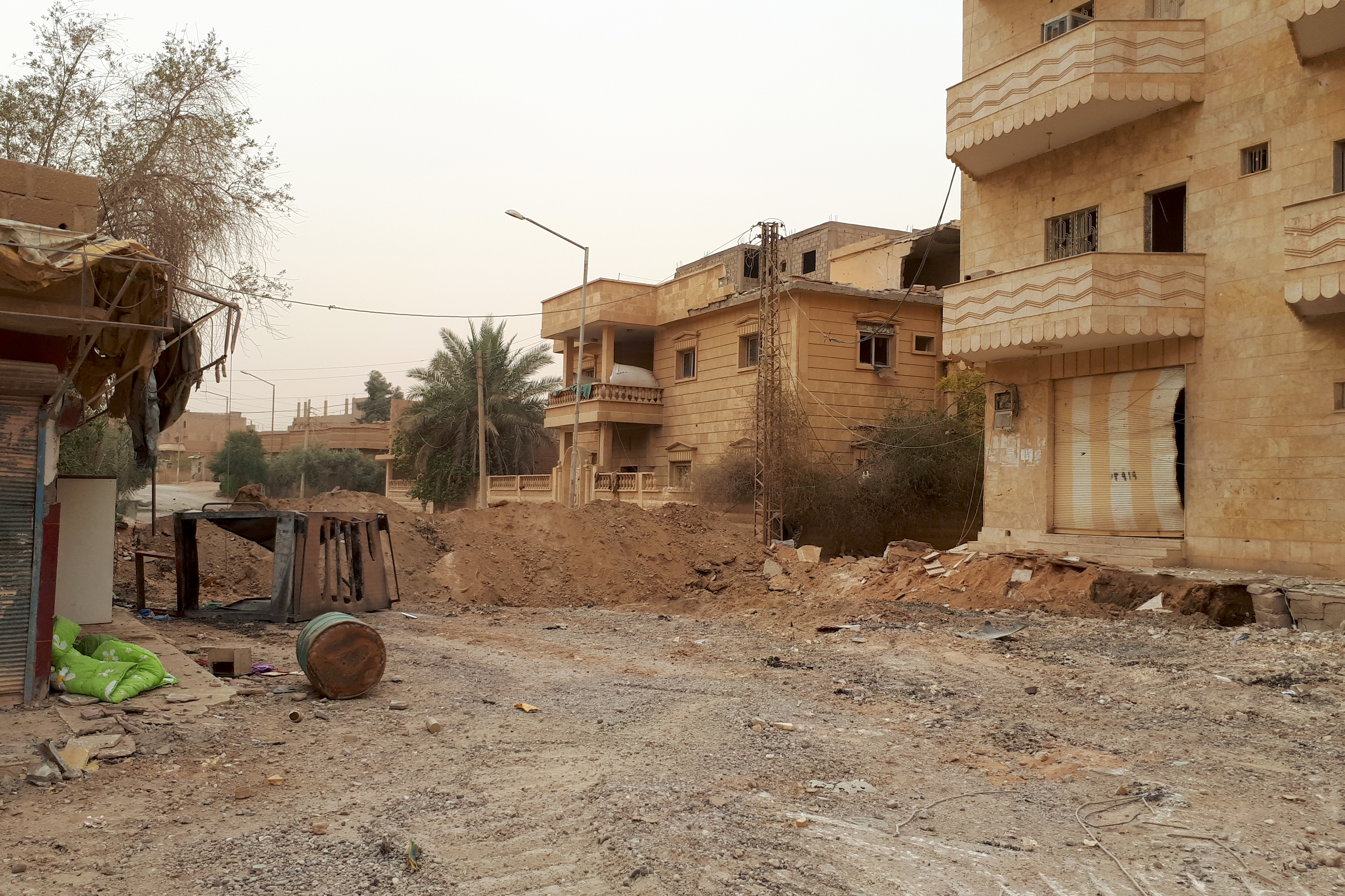 Абу-Камаль (фото от 19 ноября 2017 года)